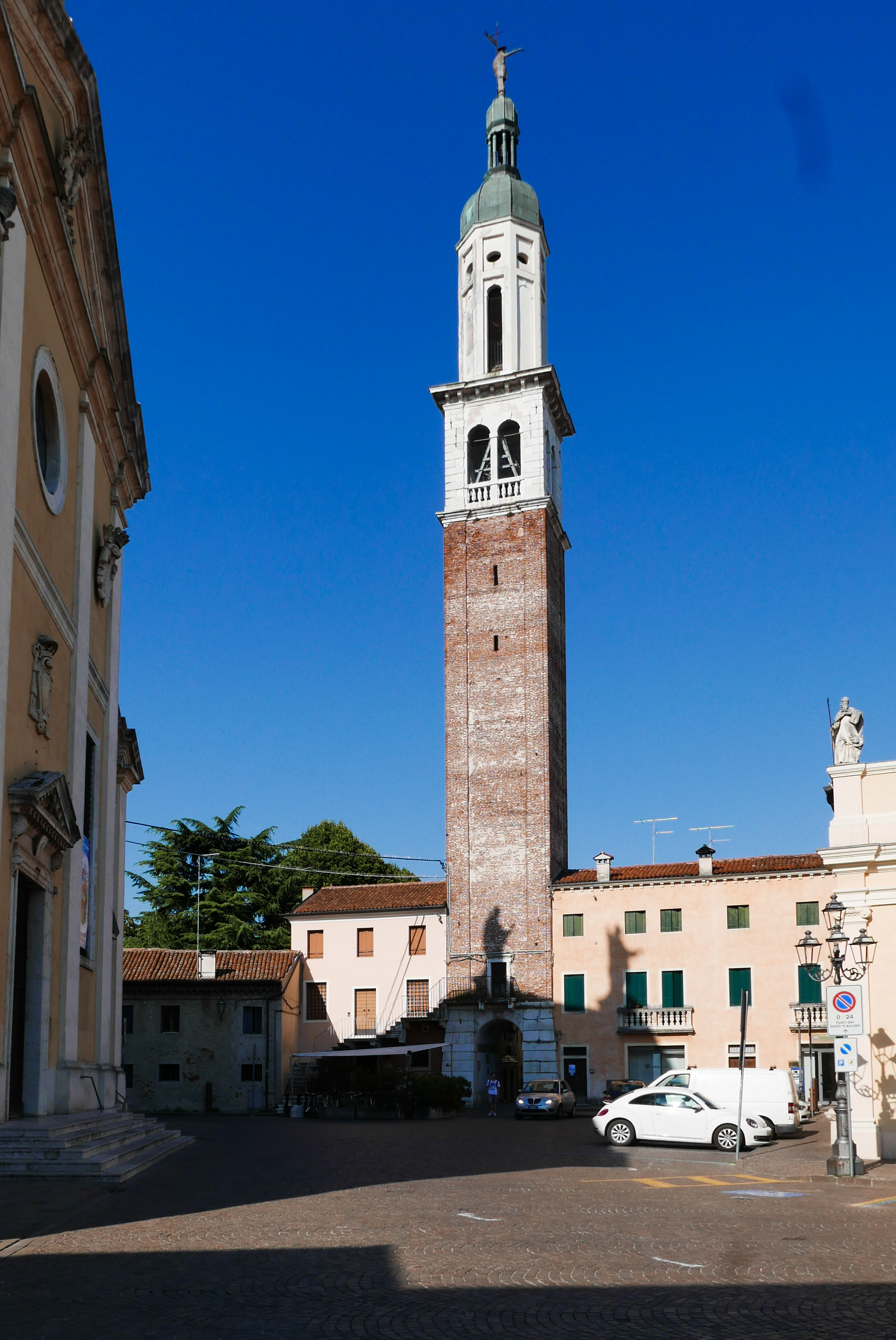 Campanile